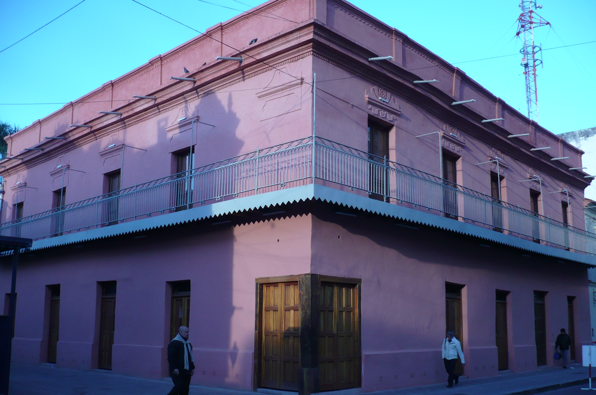 El edificio data del año 1806 y fue construido por el comerciante, soldado y político Juan Galo Leguizamón. Su salón era la tertulia más animada de la Ciudad de Salta. La colección que albergaba el museo cuando se encontraba abierto al público es muy valiosa, contando con un total de 1000 piezas diversas, como vajilla, artefactos eléctricos, imaginería, pinturas, textiles, fotografías, un piano Circa de 1850 y muebles de grandes dimensiones completan la gran colección. En el año 1979 fue declarada Monumento Histórico Nacional. Más adelante comenzaron los proyectos para su remodelación, con el fin de preservar su arquitectura y diseño original.